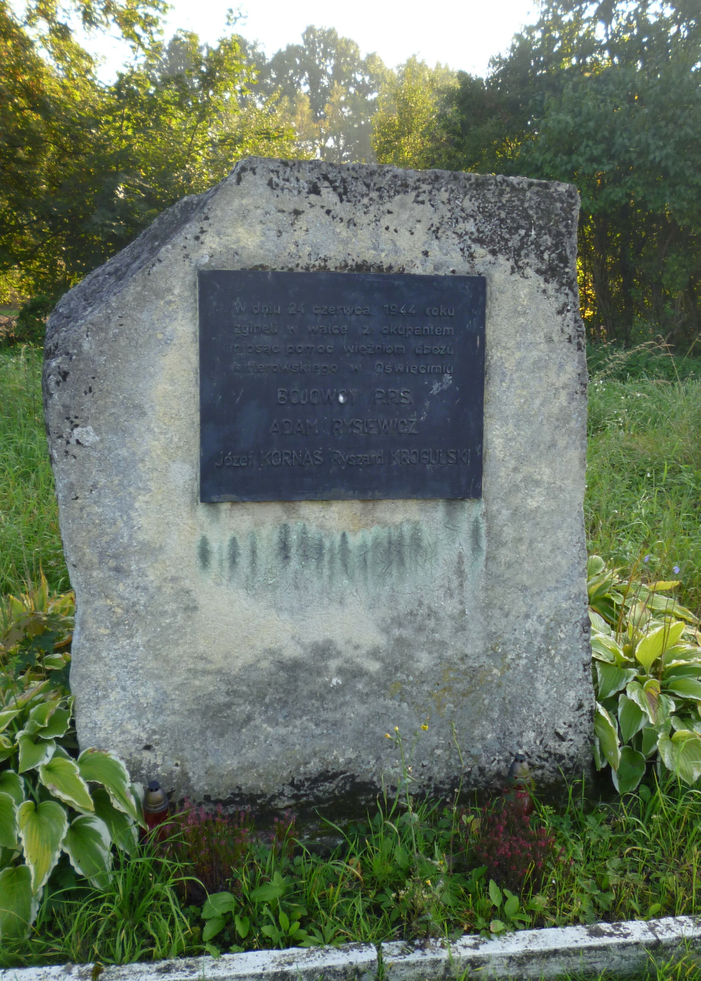 Pomnik obok stacji kolejowej w Ryczowie bojowików PPS, Adama Rysiewicza, Józefa Kornasia i Ryszarda Krogulskiego”